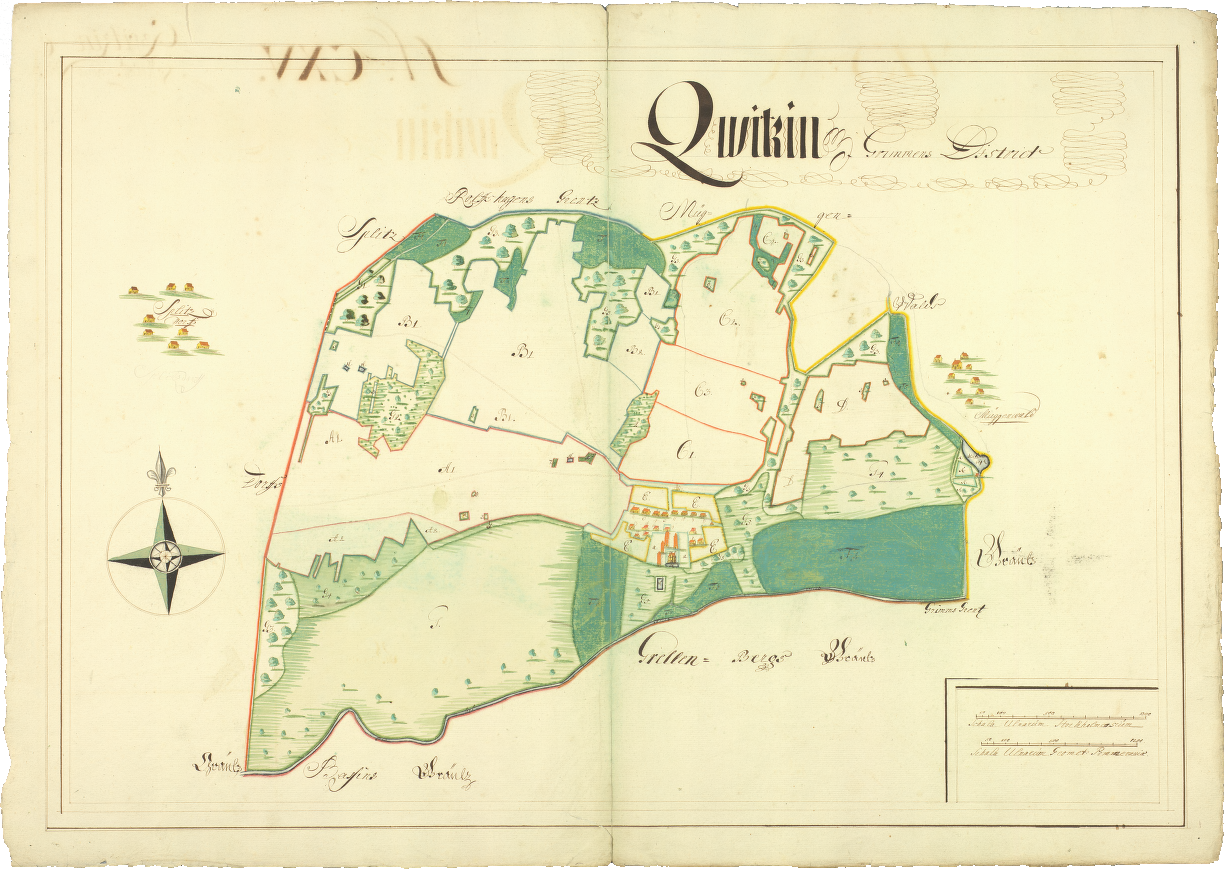 Schwedische Matrikelkarte des Gutes Quitzin in Schwedisch-Pommern durch Jernstroem (1696).